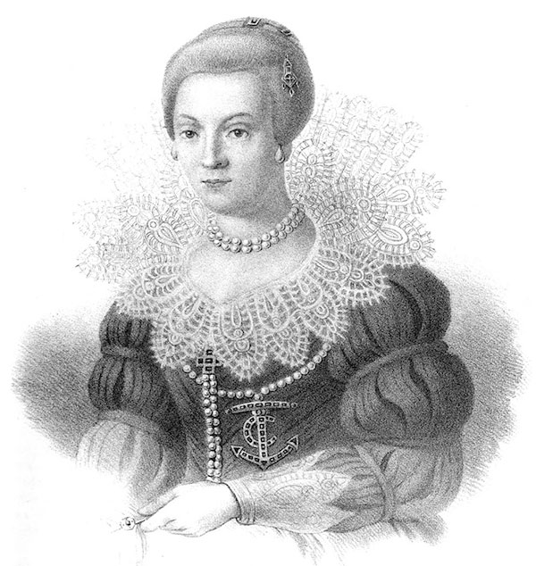 Maria av Pfalz (1561-1589)